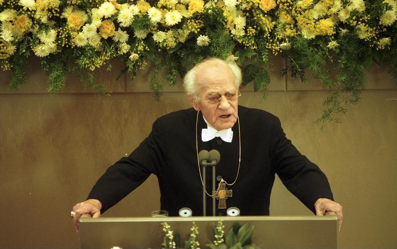 Bonn, 12. Januar 1990 Trauerstaatsakt für den am 31.12.1989 verstorbenen ehemaligen Bundesminister Dr. Gerhard Schröder. In Anwesenheit des Bundespräsidenten, des Präsidenten des Bundesverfassungsgerichts und von Mitgliedern der Bundesregierung, des Bundestages und des Bundesrates würdigten Bundestagspräsidentin Prof. Rita Süssmuth, Bundeskanzler Dr. Helmut Kohl und der frühere Bischof Dr. D. Hermann Kunst das politische Lebenswerk des Verstorbenen.